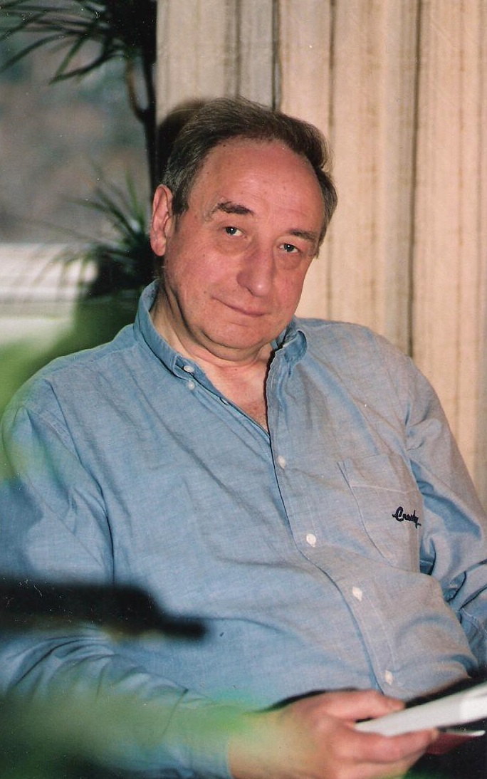 Willy Deweert